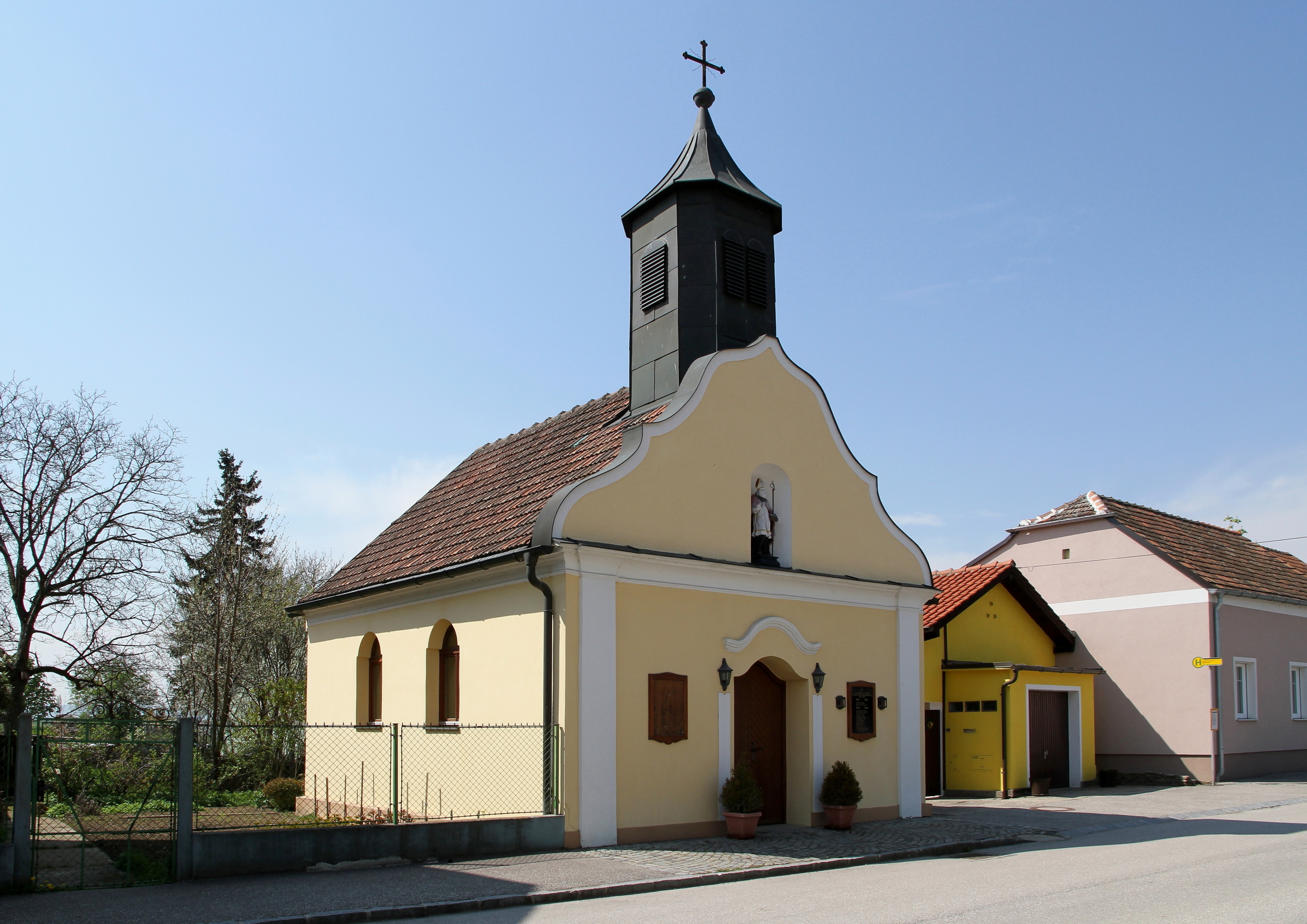 Denkmalgeschützte Ortskapelle hl. Nikolaus von Langenschönbichl, ein Ortsteil der niederösterreichischen Marktgemeinde Langenrohr.